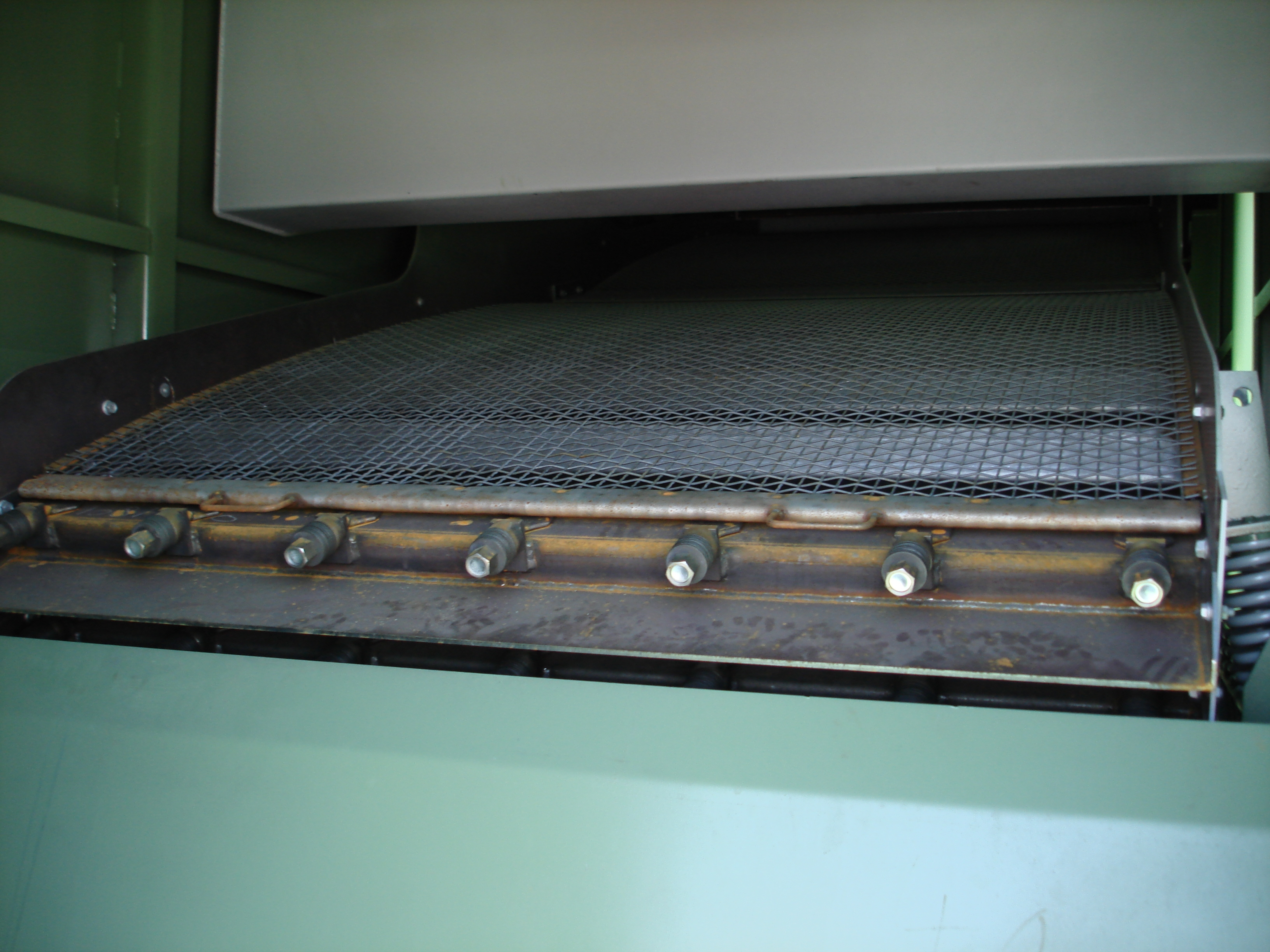 Ein Teil der Heißabsiebeeinheit in einer Asphaltmischanlage